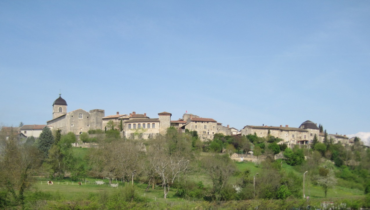 Pérouges